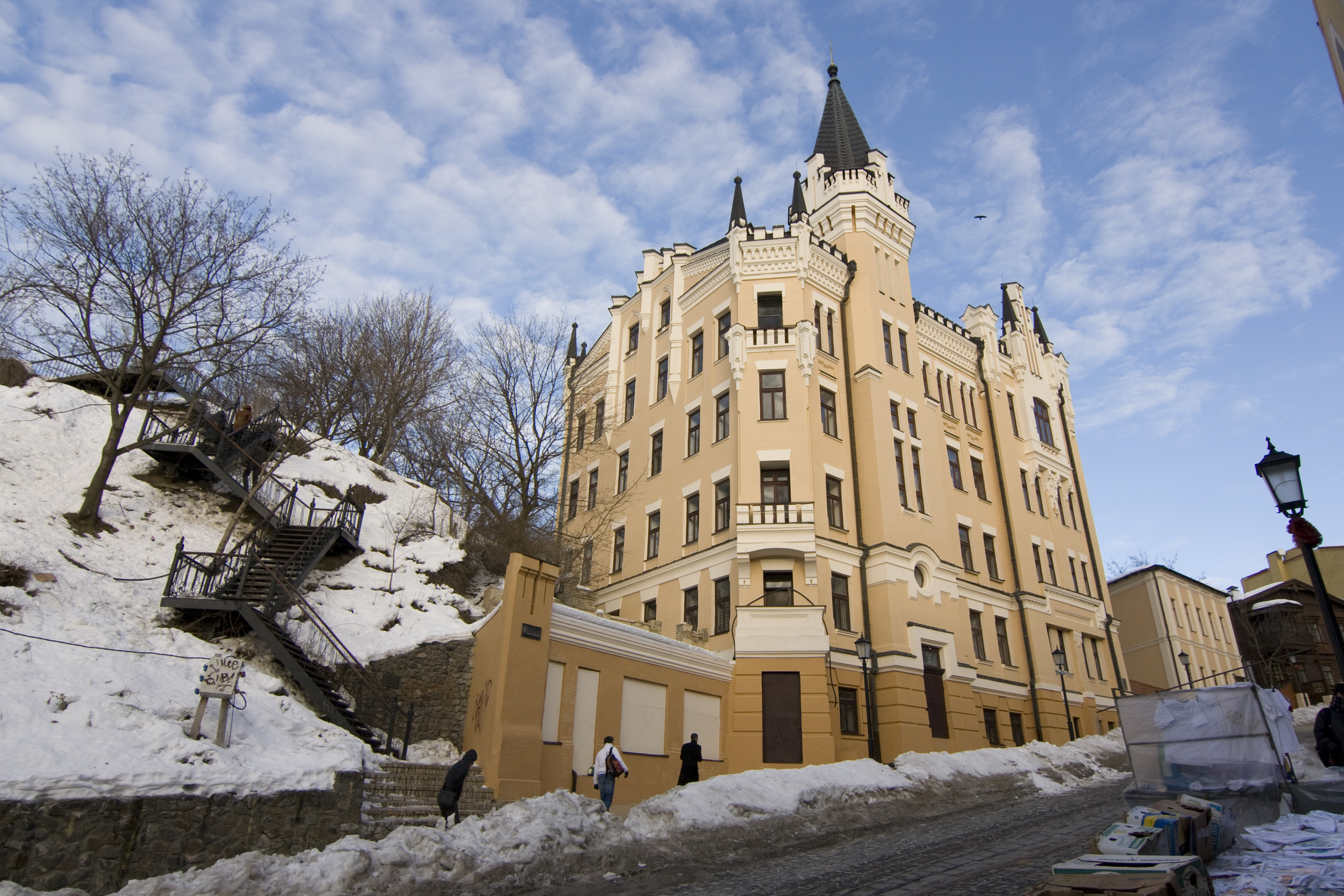 Podil's'kyi district, Kiev, Ukraine